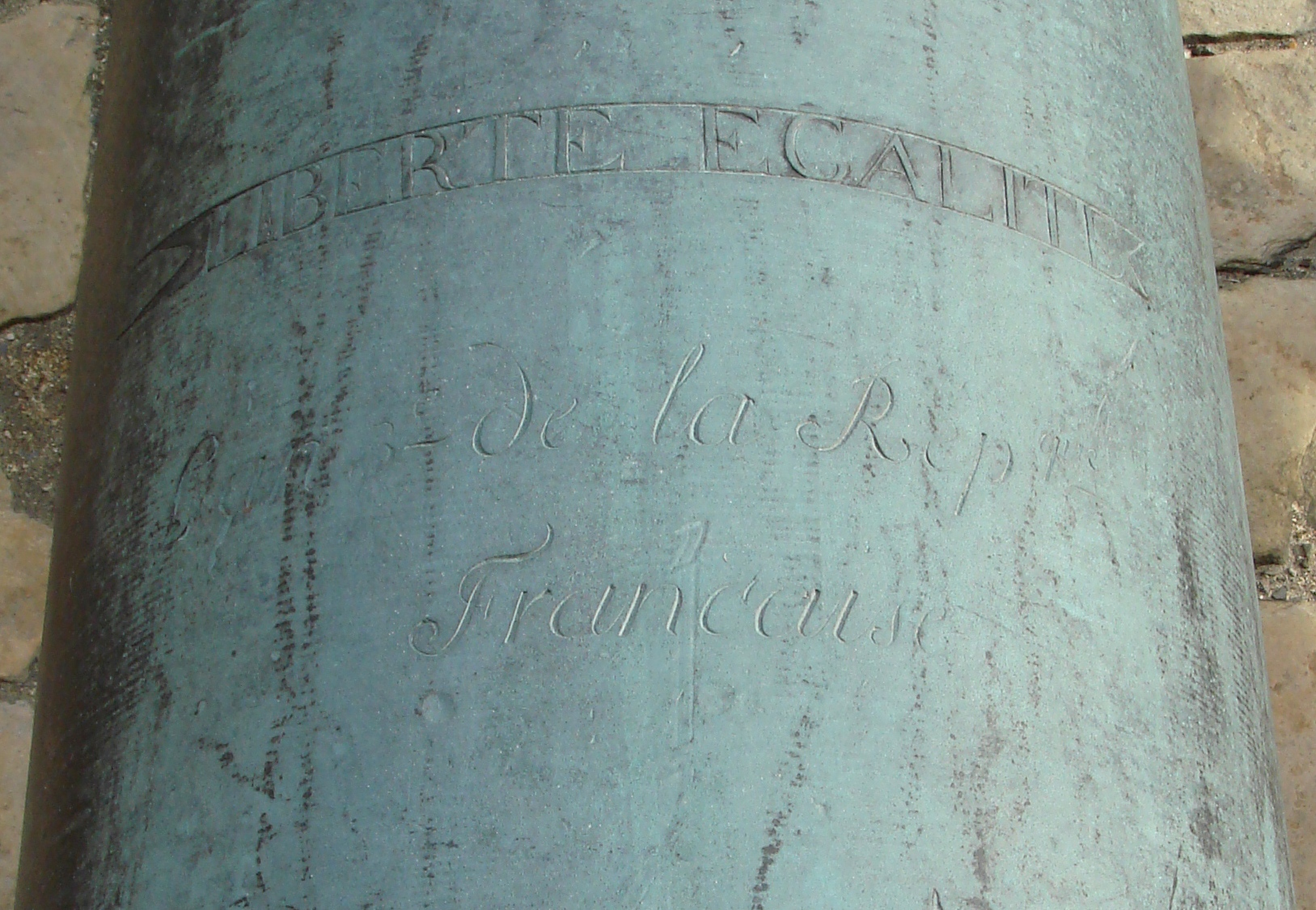 Inscription on Le Sonnant: "Liberté Egalité. L'an 3 de la République Française".